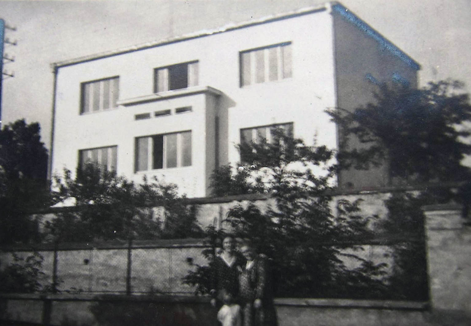 Nová fara Bohumíra Kozáka od Labe